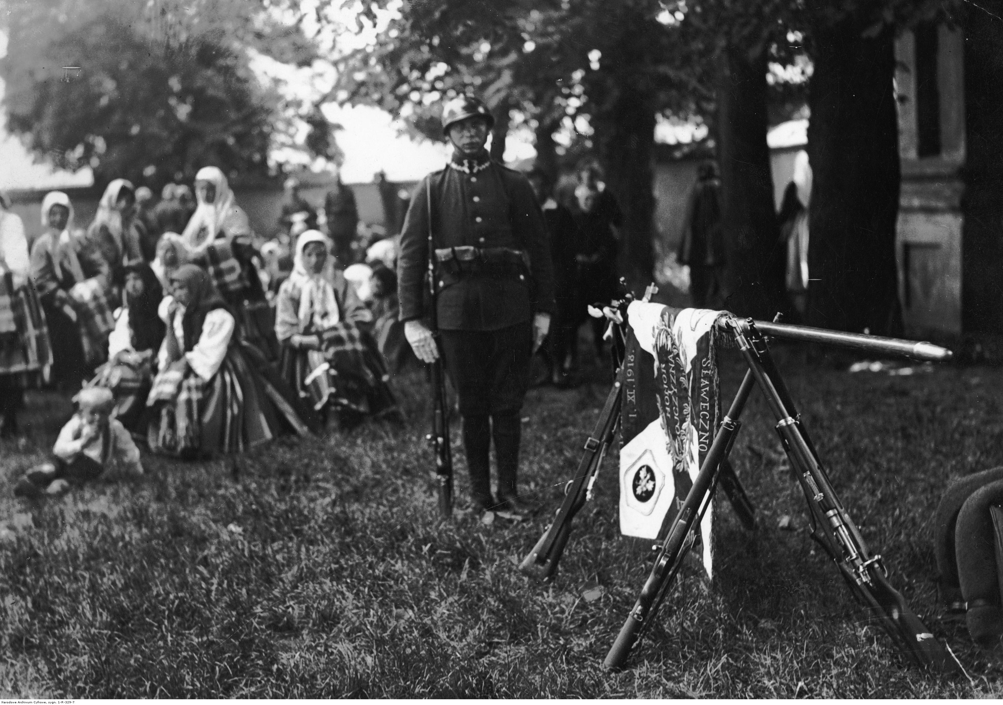 Uroczystość Bożego Ciała w Łowiczu. Żołnierz przed sztandarem 10 Pułku Piechoty, który brał udział w procesji. Koncern Ilustrowany Kurier Codzienny - Archiwum Ilustracji. Sygnatura: 1-R-329-7